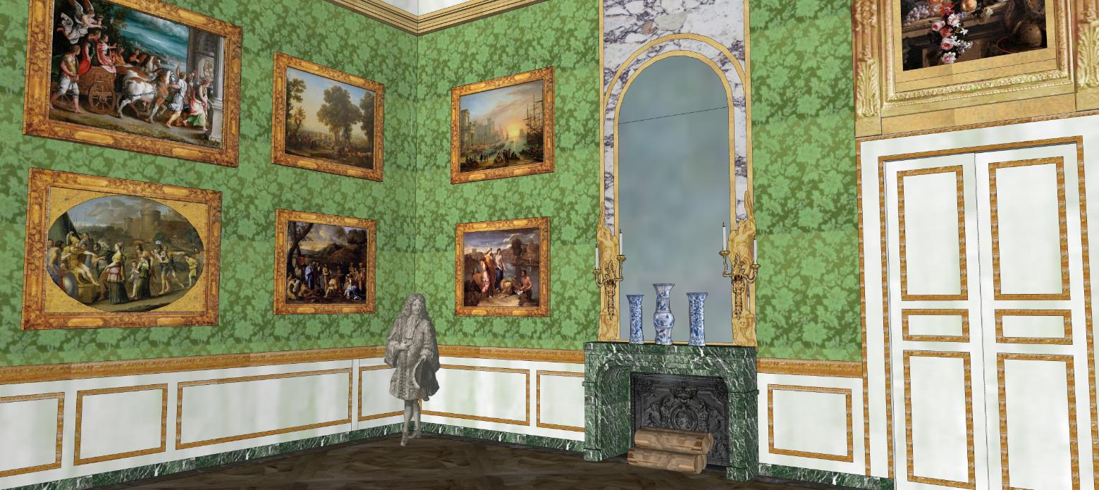 Proposition de restitution de l'antichambre du Dauphin au château-vieux de Meudon, vers 1700.